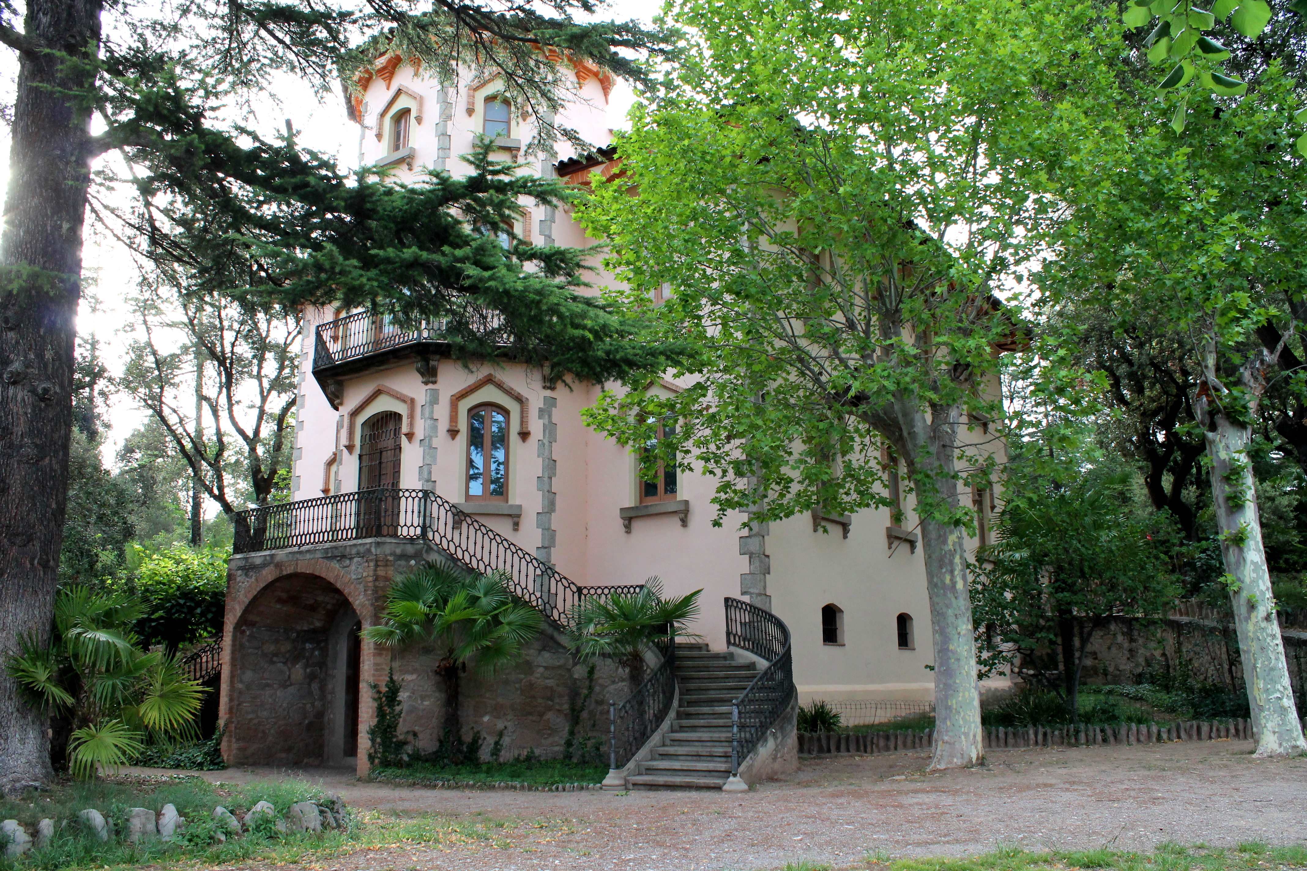 Torre Vella, antiga residència dels amos de la Colònia Pons